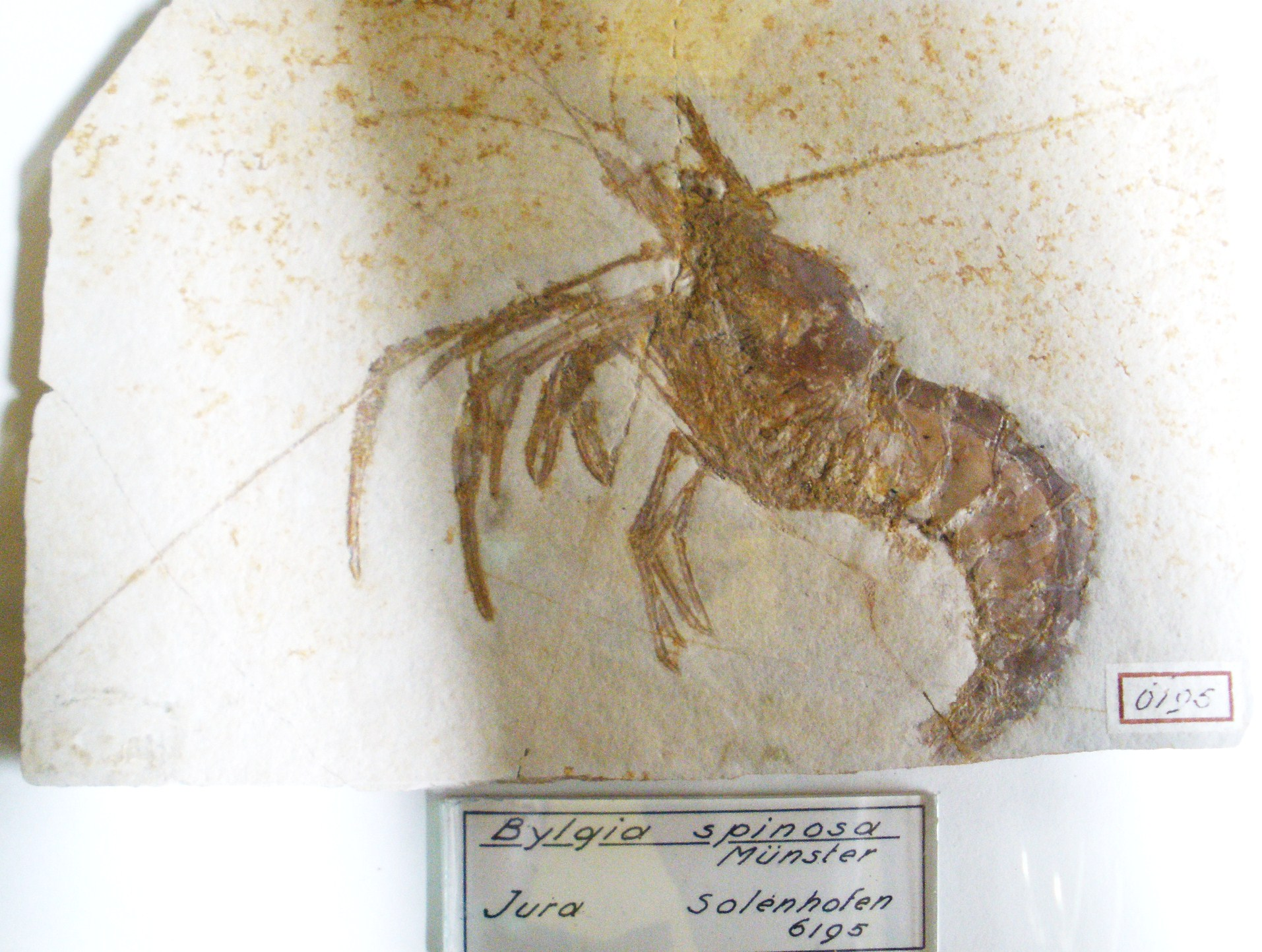 Fossil of Bylgia, an extinct crustacean - Took the photo at Teylers Museum, Haarlem